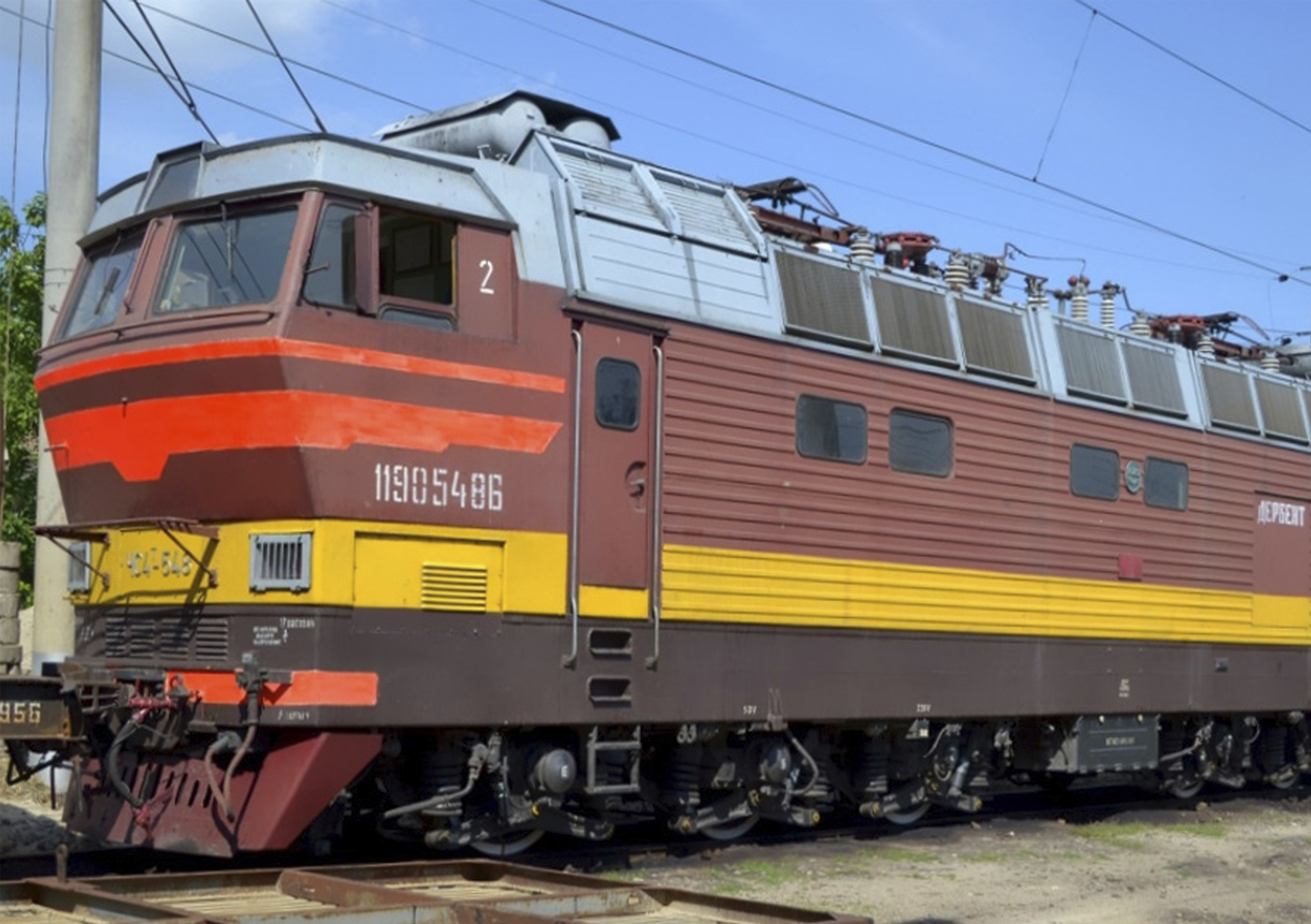 Построен на заводе «ШКОДА», Чехословакия в 1974 году